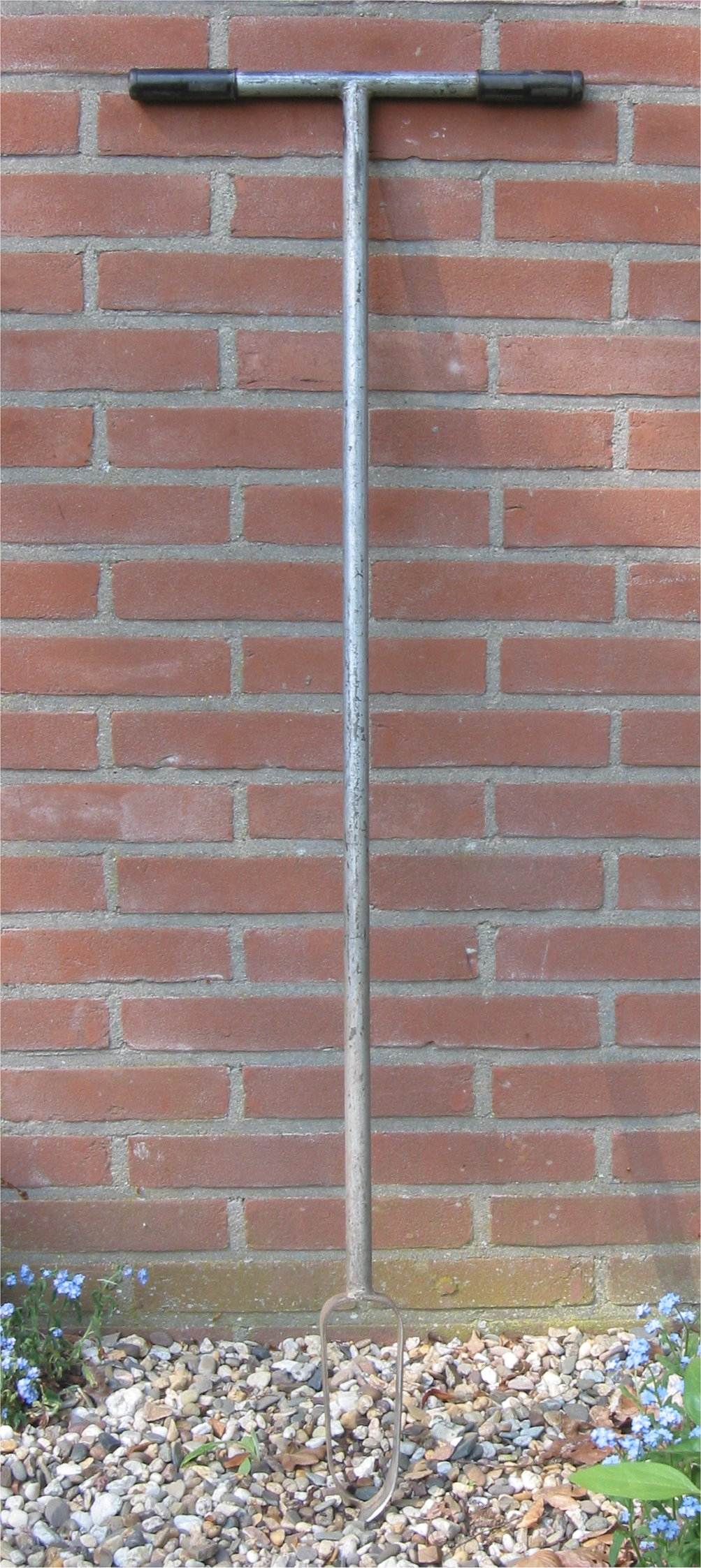 Grondboor